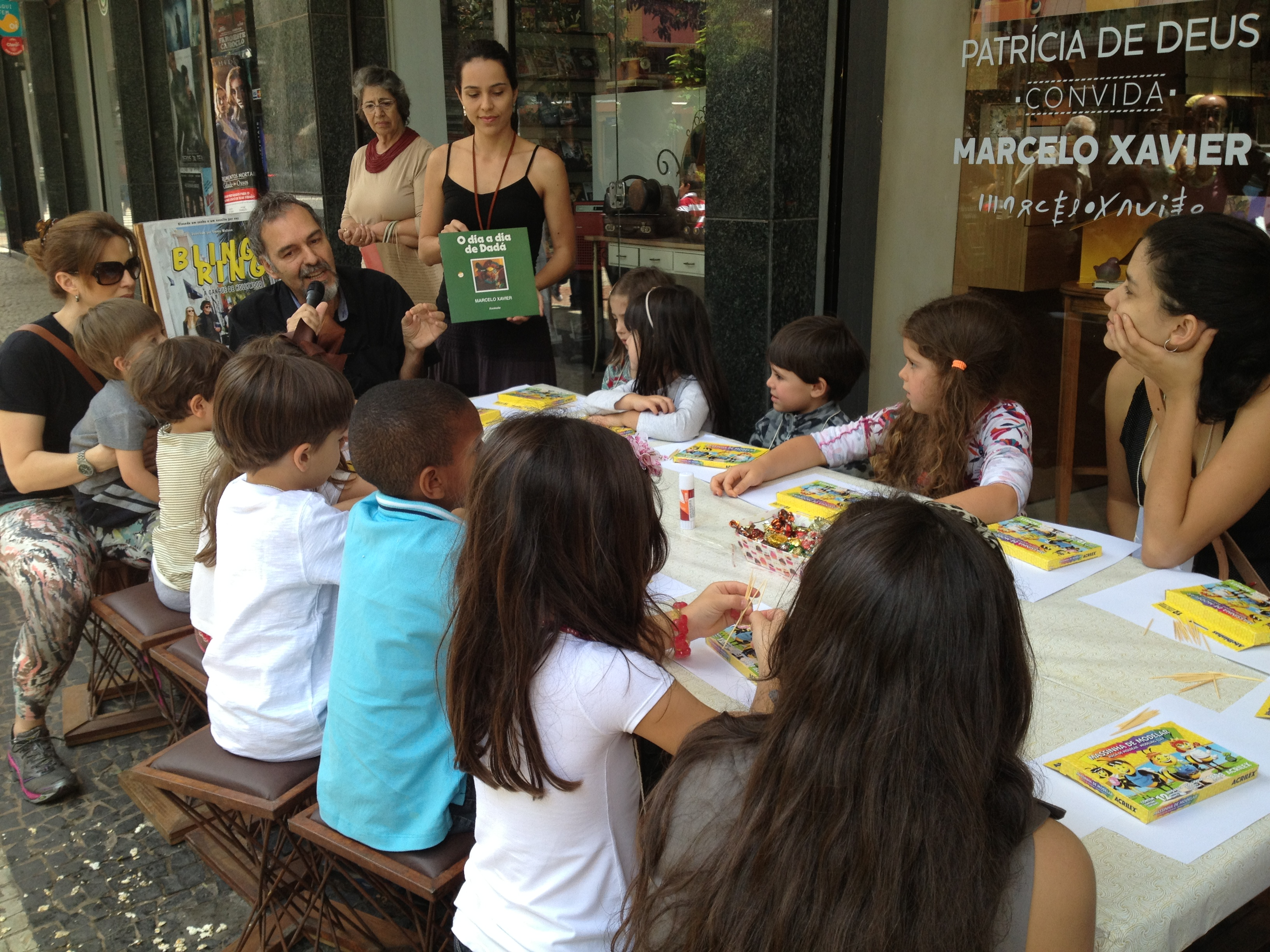 Oficina na loja Patrícia de Deus